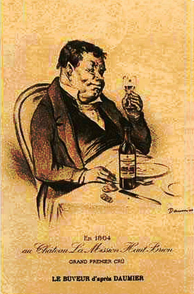 Le buveur d'Honoré Daumier 1864